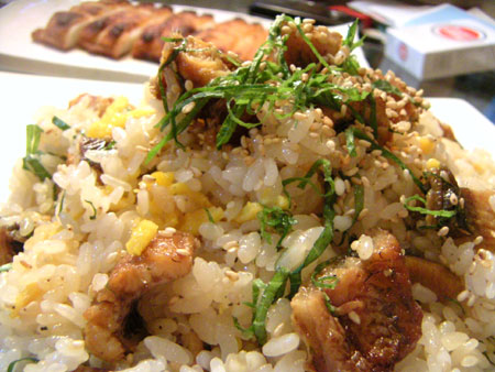 chirashi-sushi